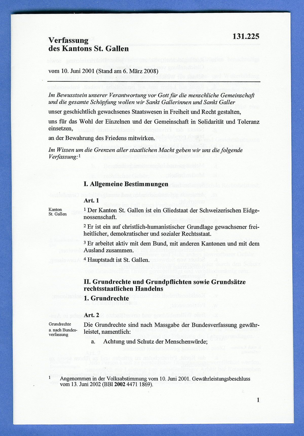 Erste Seite der Kantonsverfassung des Kantons St. Gallen, auf blauen Untergrund